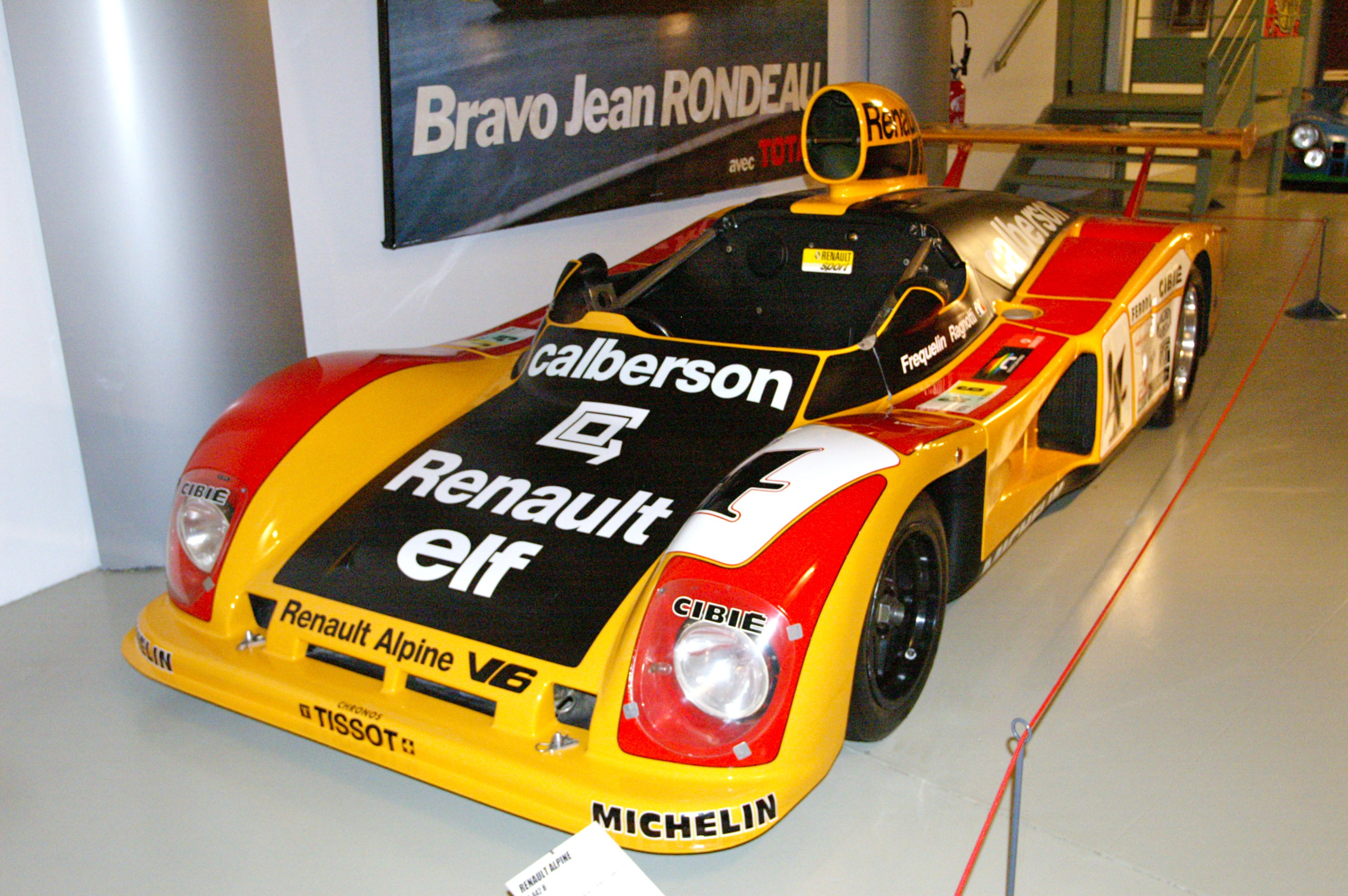 Le Musee des 24 Heures. Winner Le Mans 1978. This particular car came 4th